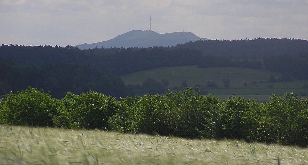 Morgenstimmung mit Blick zum Hesselberg